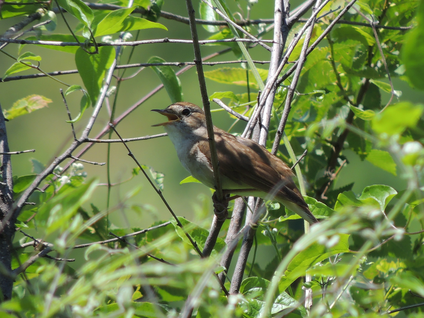 Srpski naziv mali slavuj Opis vrste D.t. 15–17 cm. Naseljava zapadnu, centralnu i južnu Evropu, delove Male Azije, jugozapadne Azije i severne Afrike. Izrazita je selica. Zimu provodi u podsaharskoj Africi. Staništa su mu mozaični predeli sa gustim žbunjem i prizemnom vegetacijom, obodi listopadnih šuma, živice, voćnjaci, parkovi i vrtovi u ravnici i pobrđu. Gnezda smešta na tlo gde ih pažljivo sakriva u prizemnoj vegetaciji. Hrani se različitim beskičmenjacima (insekti, gliste), kao i bobicama u periodu pred jesenju seobu. Evropska populacija je stabilna. U Srbiji se populacija procenjuje na 120.000–200.000 parova, sa trendom blagog opadanja brojnosti (Puzović et al 2009). Status zaštite vrste IUCN crvena lista - Kategorija LC; Ptice od posebnog značaja za zaštitu u Evropi: Non SPEC e; Konvencija o očuvanju evropske divlje flore i faune i prirodnih staništa - Annex I; Pravilnik o proglašenju i zaštiti strogo zaštićenih i zaštićenih divljih vrsta biljaka, životinja i gljiva: Prilog I Strogo zaštićene divlje vrste biljaka, životinja i gljiva